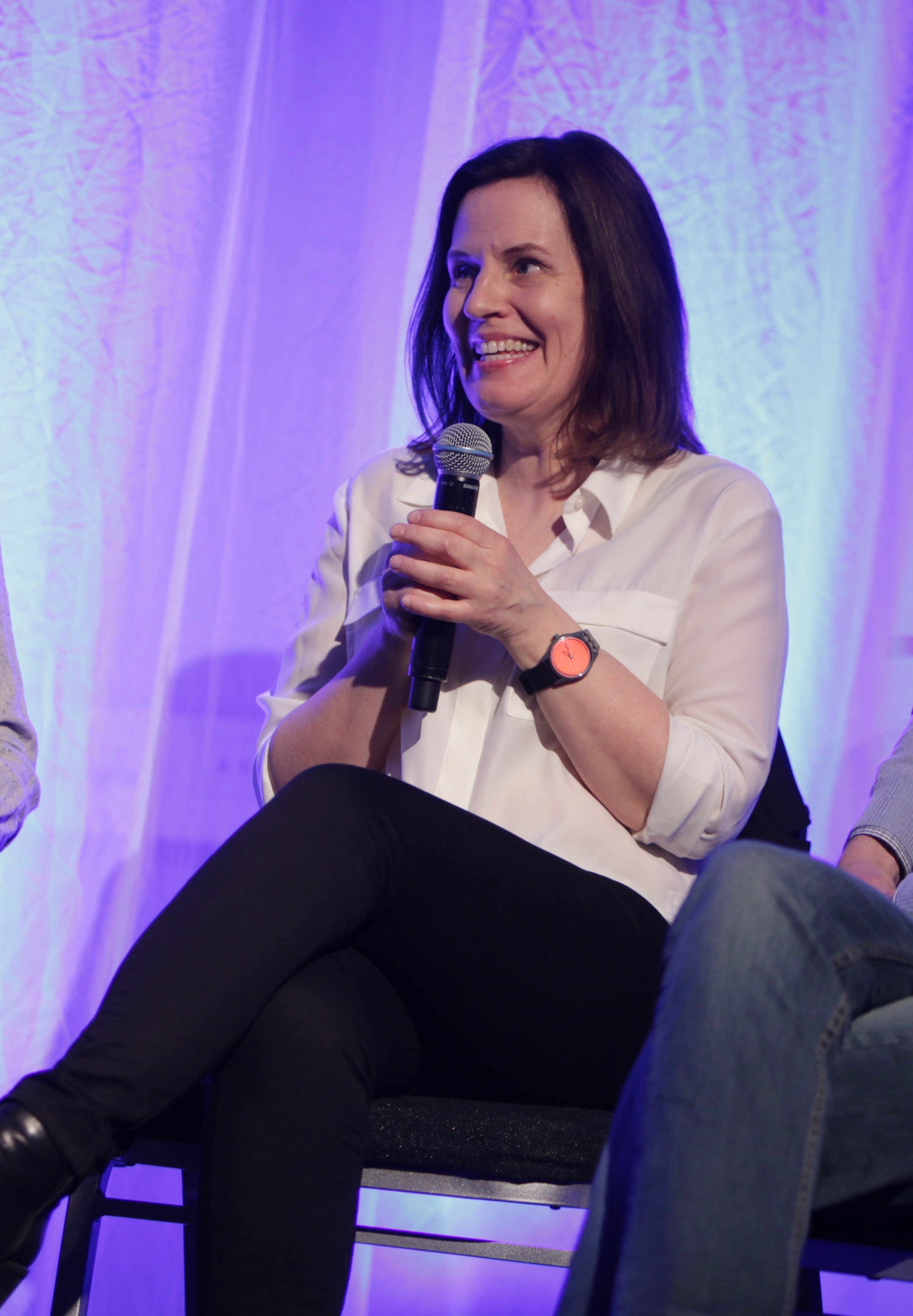 UiB- Hvilken kompetanse er det behov for i fremtidens medielandskap? Medvirkende: Petter Ole Jakobsen, Øyulf Hjertenes, Astrid Gynnild, Erik Stavelin. Moderator: Anne Jacibsen